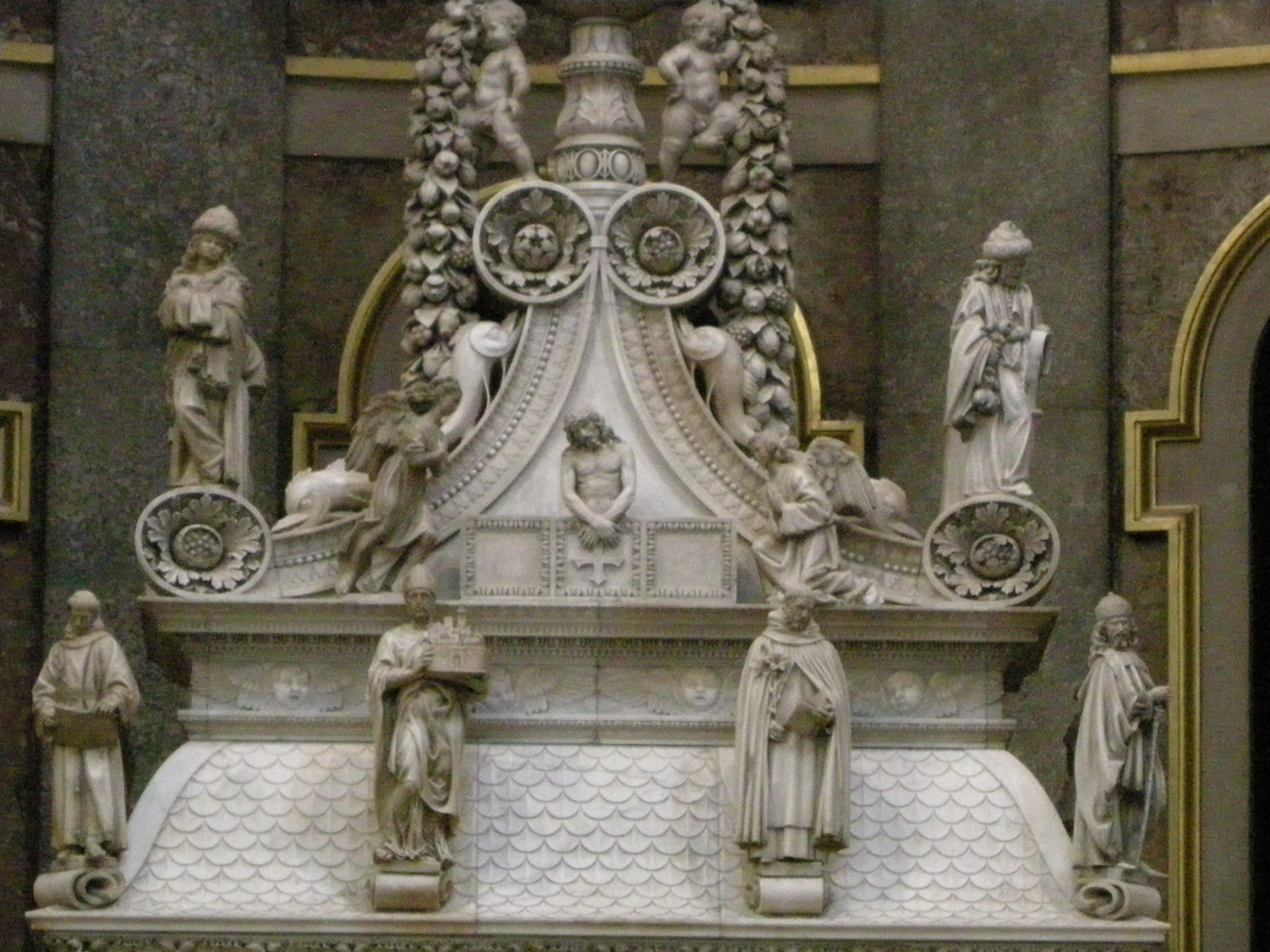 San domenico, bologna, interno, arca di san domenico 03 niccolò dell'arca